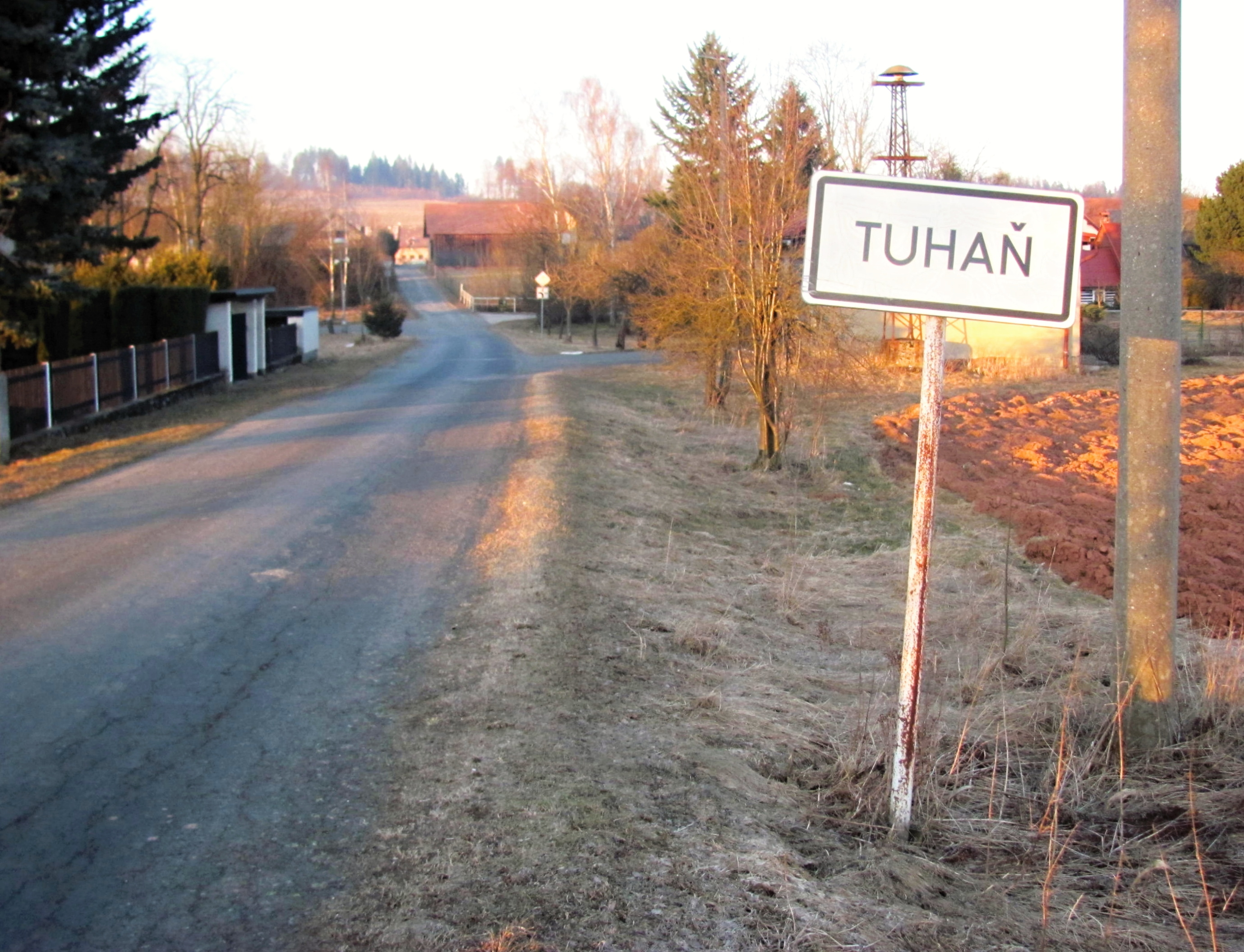 Vjezd do obce Tuhaň, okres Semily - Entrance to Tuhaň near of Semily, Bohemia